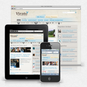 Virato.de ist auf dem Heim-PC, Smartphone und Tablet abrufbar